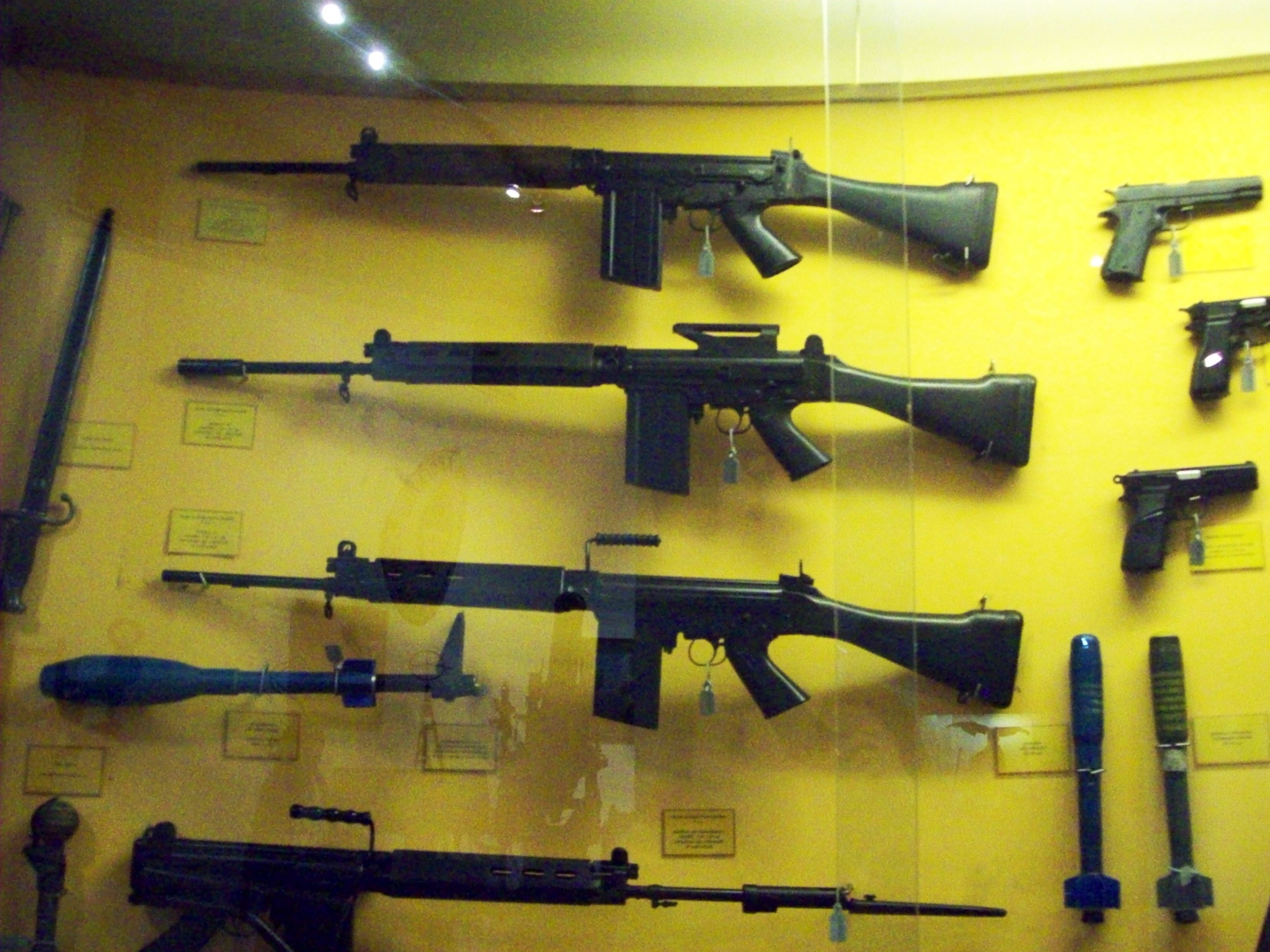 Armamento expuesto en el Museo de Armas de la Nación, ciudad de Buenos Aires, Argentina 2014.